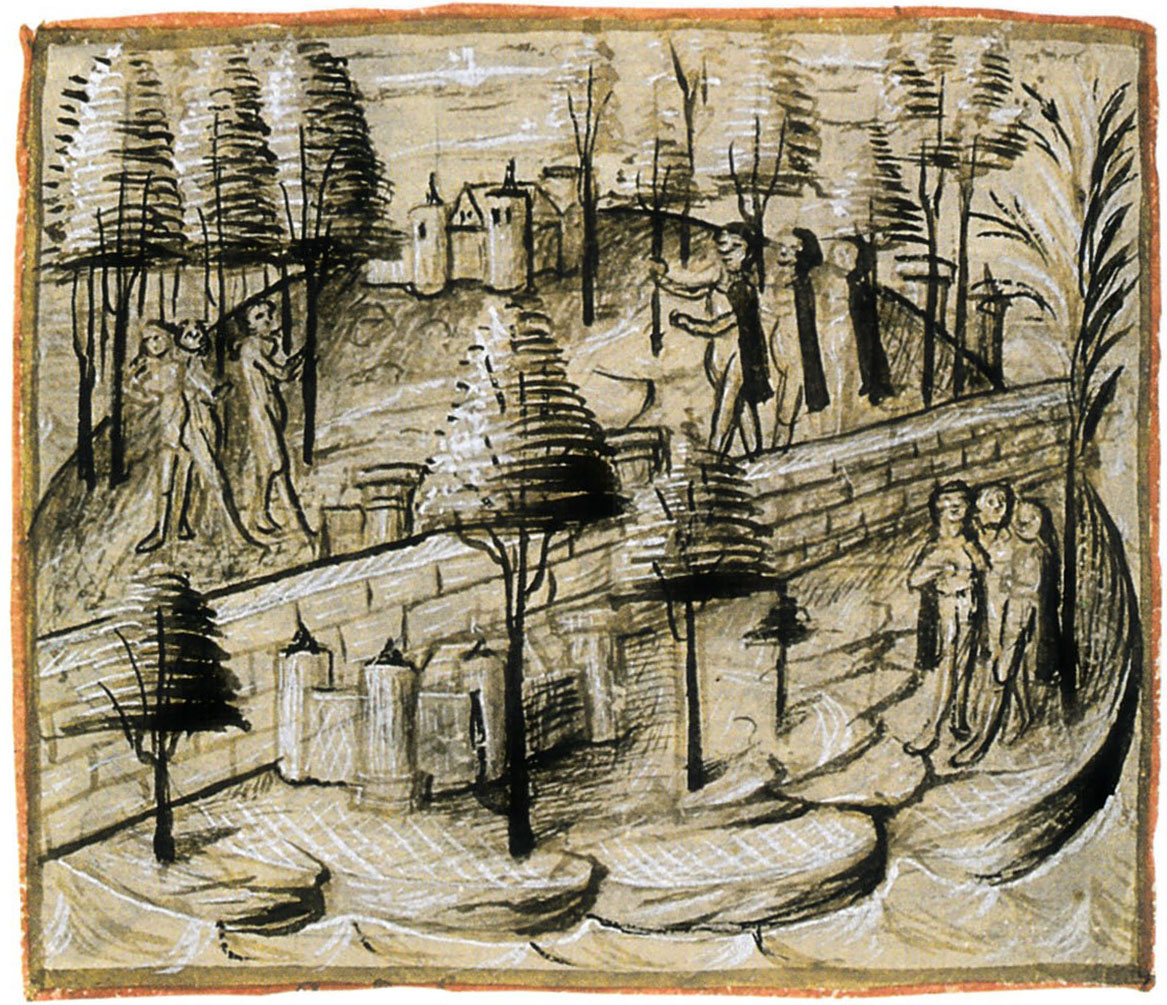 Abbildung zu Beginn des 70. Kapitels des Le Canarien Version B